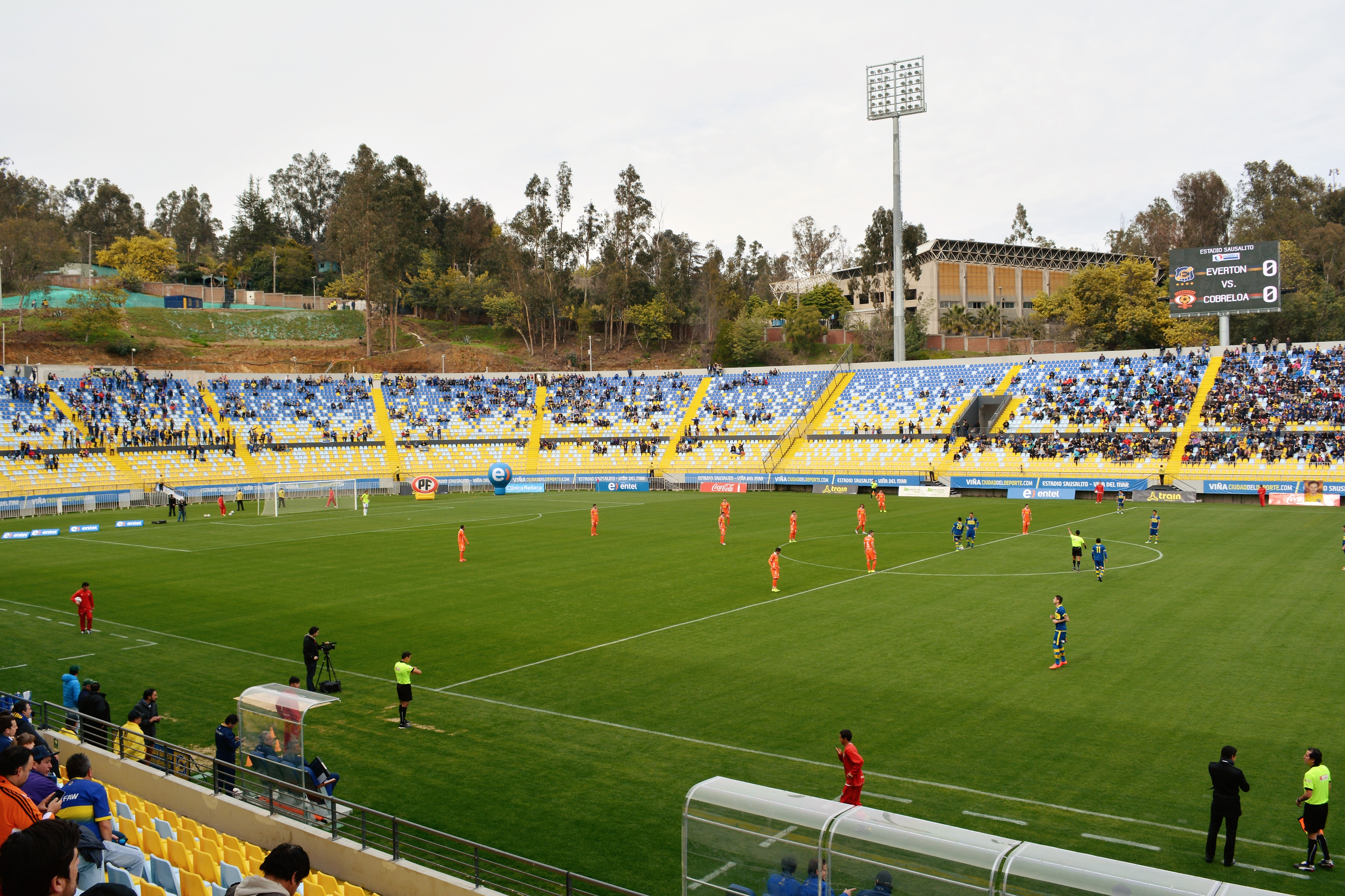 Everton - Cobreloa, Estadio Sausalito, Viña del Mar, Chile, 23-08-2015